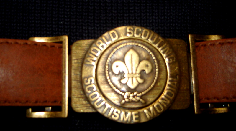 Reproducció fotogràfica de sivella de cinturó d'uniforme escolta